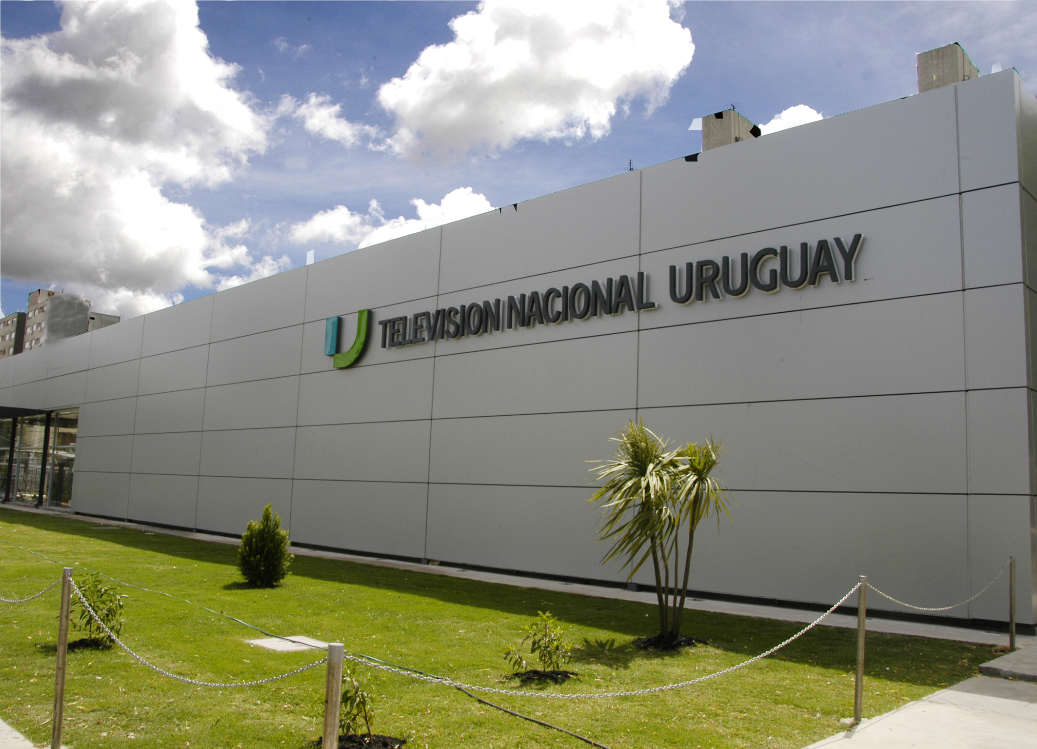 Television Nacional Uruguay Canal 5